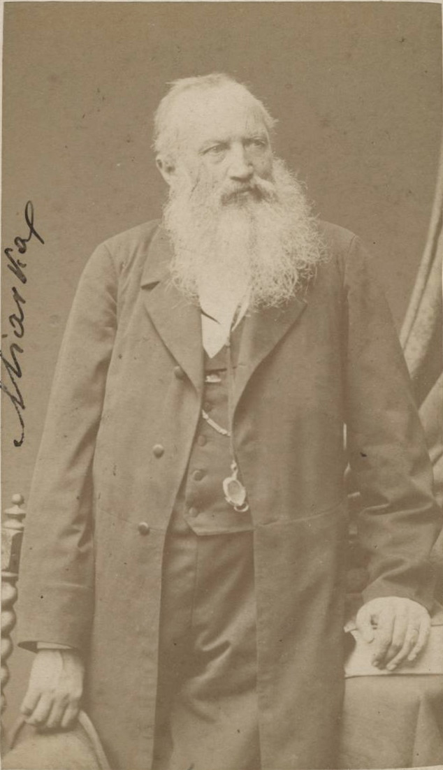 Karol Miarka starszy, zdjęcie Jana Mieczkowskiego